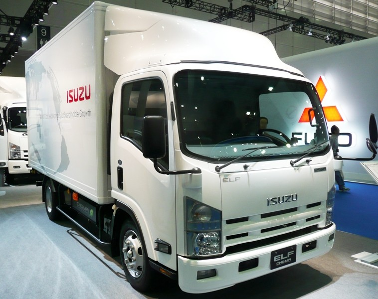 Isuzu Elf CNG-MPI.